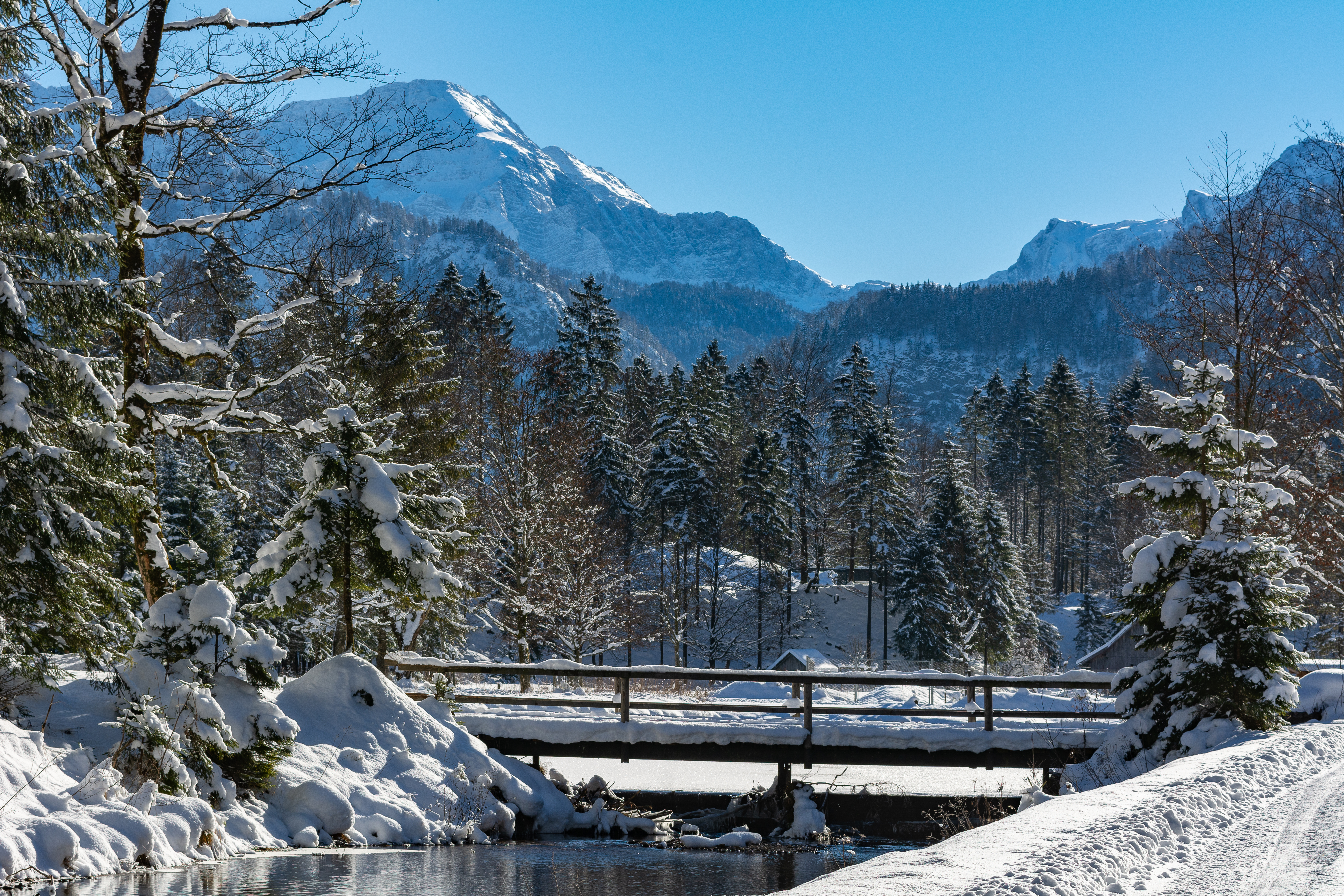 Der Cumberland Wildlife Park in Grünau im Almtal wurde von der Herzog von Cumberland Stiftung gegründet und wird seit 2009 von einen gemeinnützigen Verein betrieben.